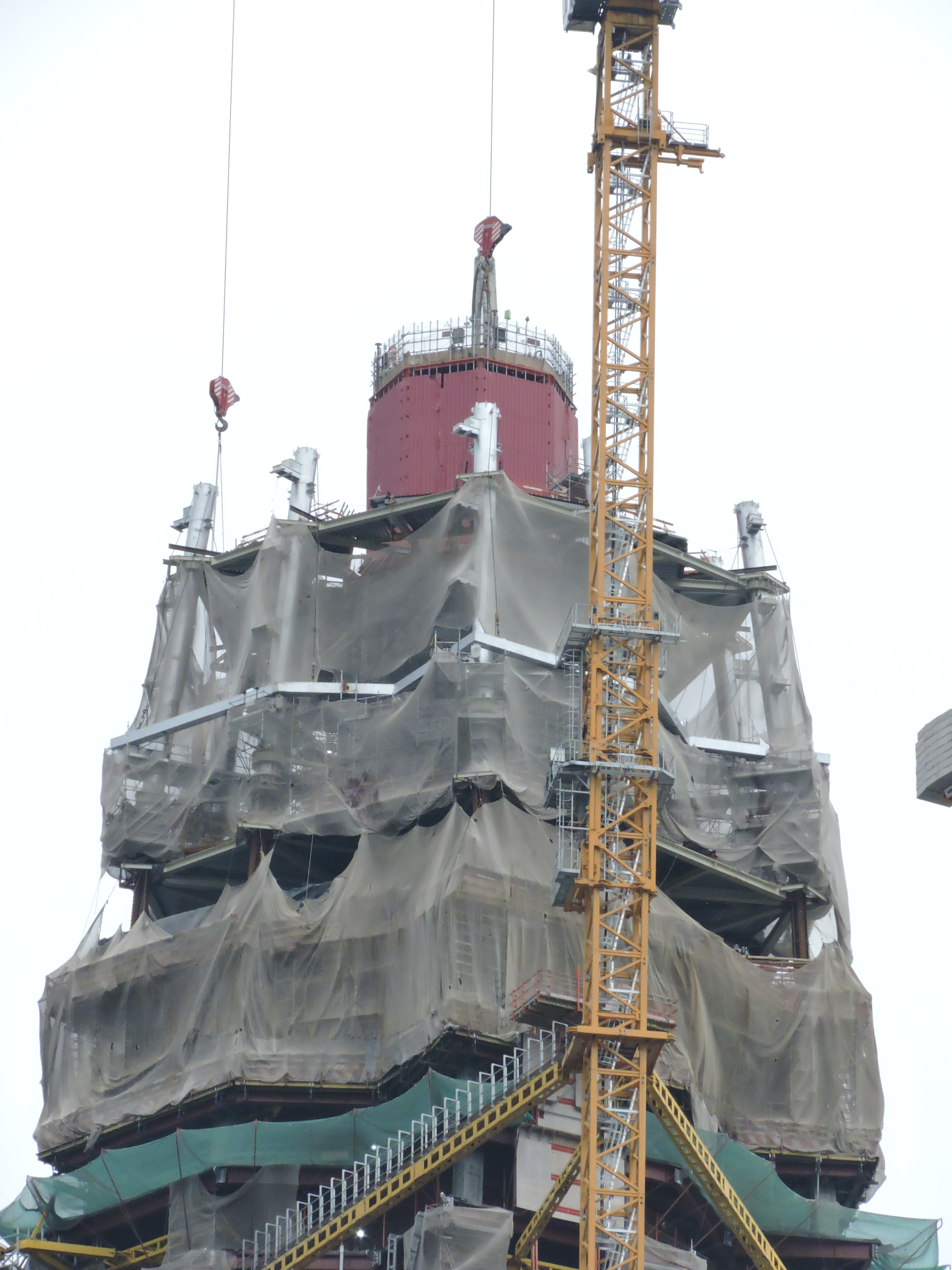 Работа над ядром Лахта-центра завершена, идёт монтаж конструкций шпиля